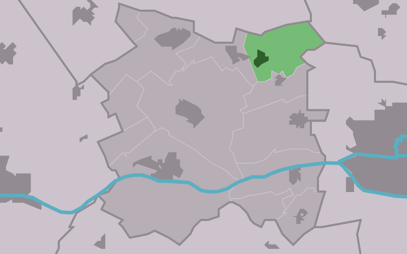 Kaartsje fan himrik fan Bitgummole